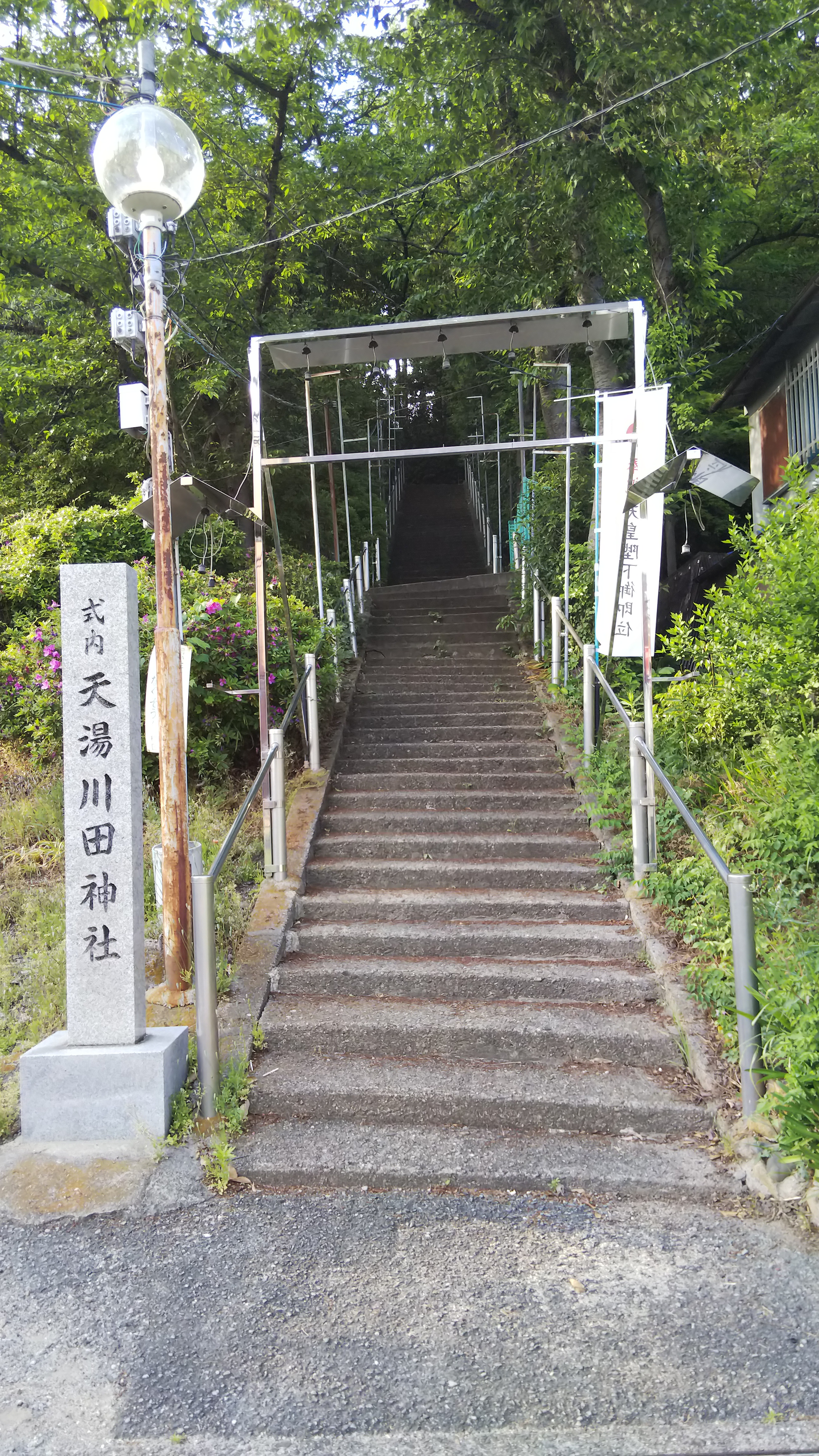 天湯川田神社境内入口